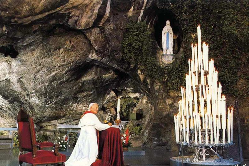 Visite du Pape Jean-Paul II aux Sanctuaires NDL (1983)